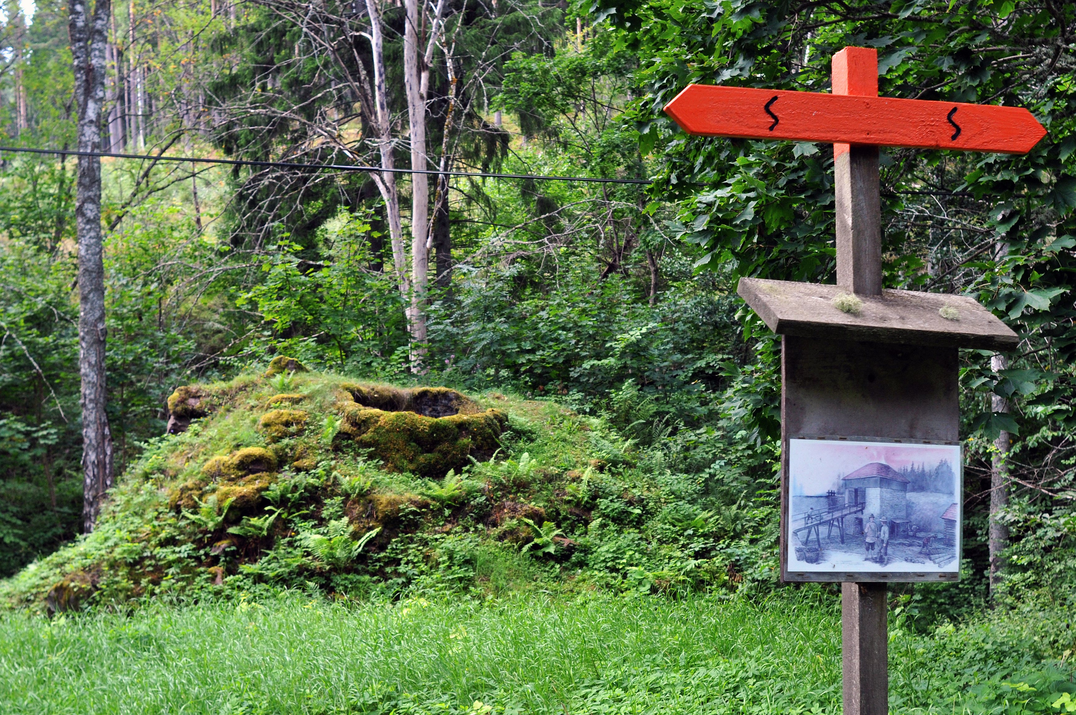 Förola gruvas masugn i Svärta.